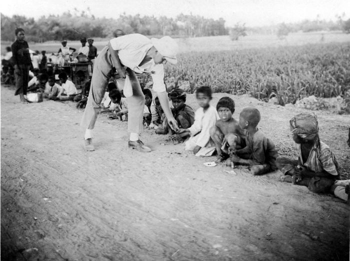 Repronegatief. Tabak, het uitbetalen van de rupsenvangers, Vorstenlanden